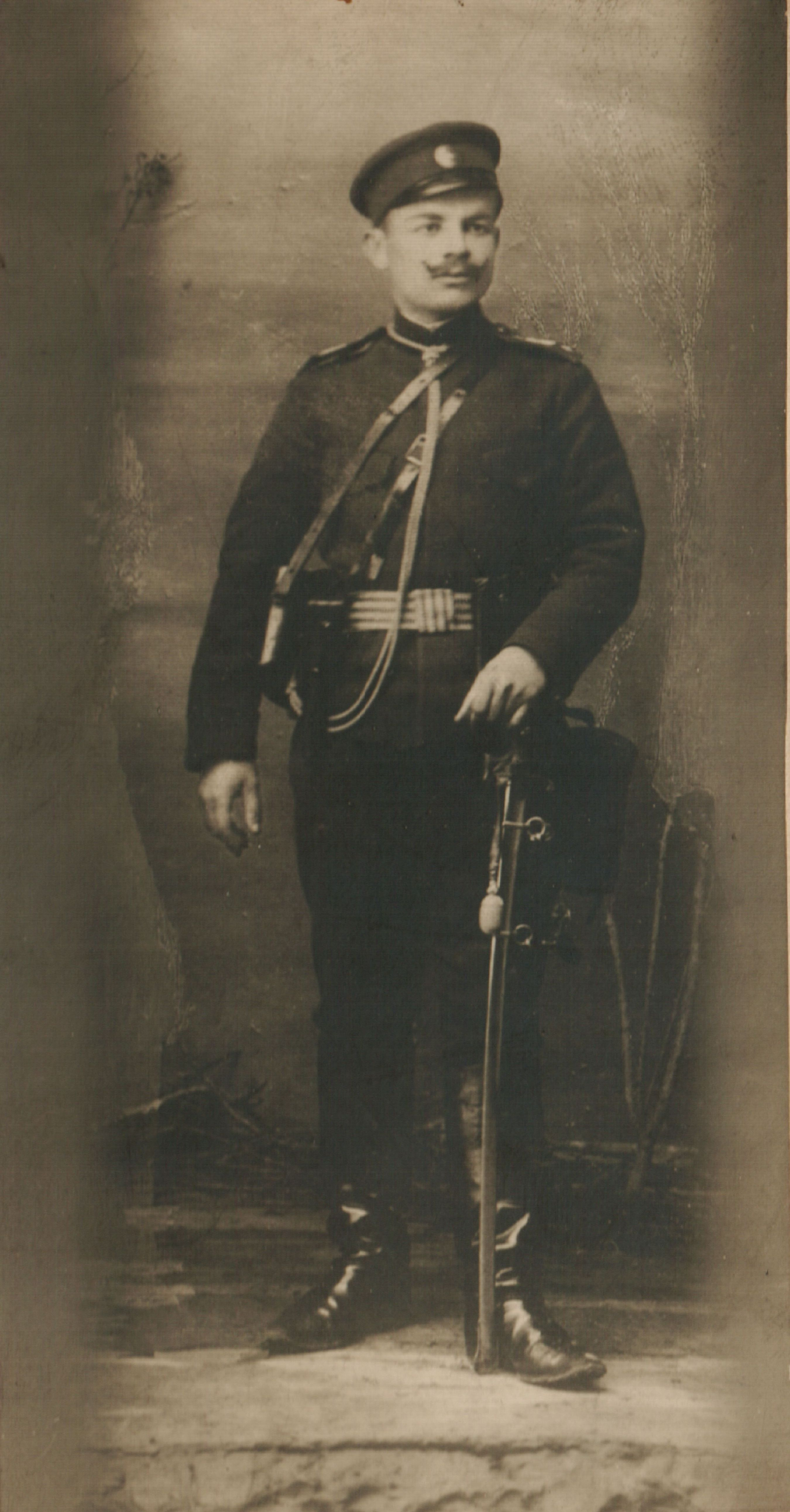 Снимка на Йордан Весков.